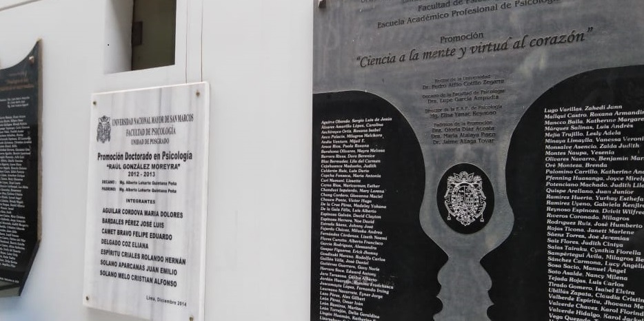 UNMSM Facultad de Psicología 2019 - Placas Conmemorativas de Graduados